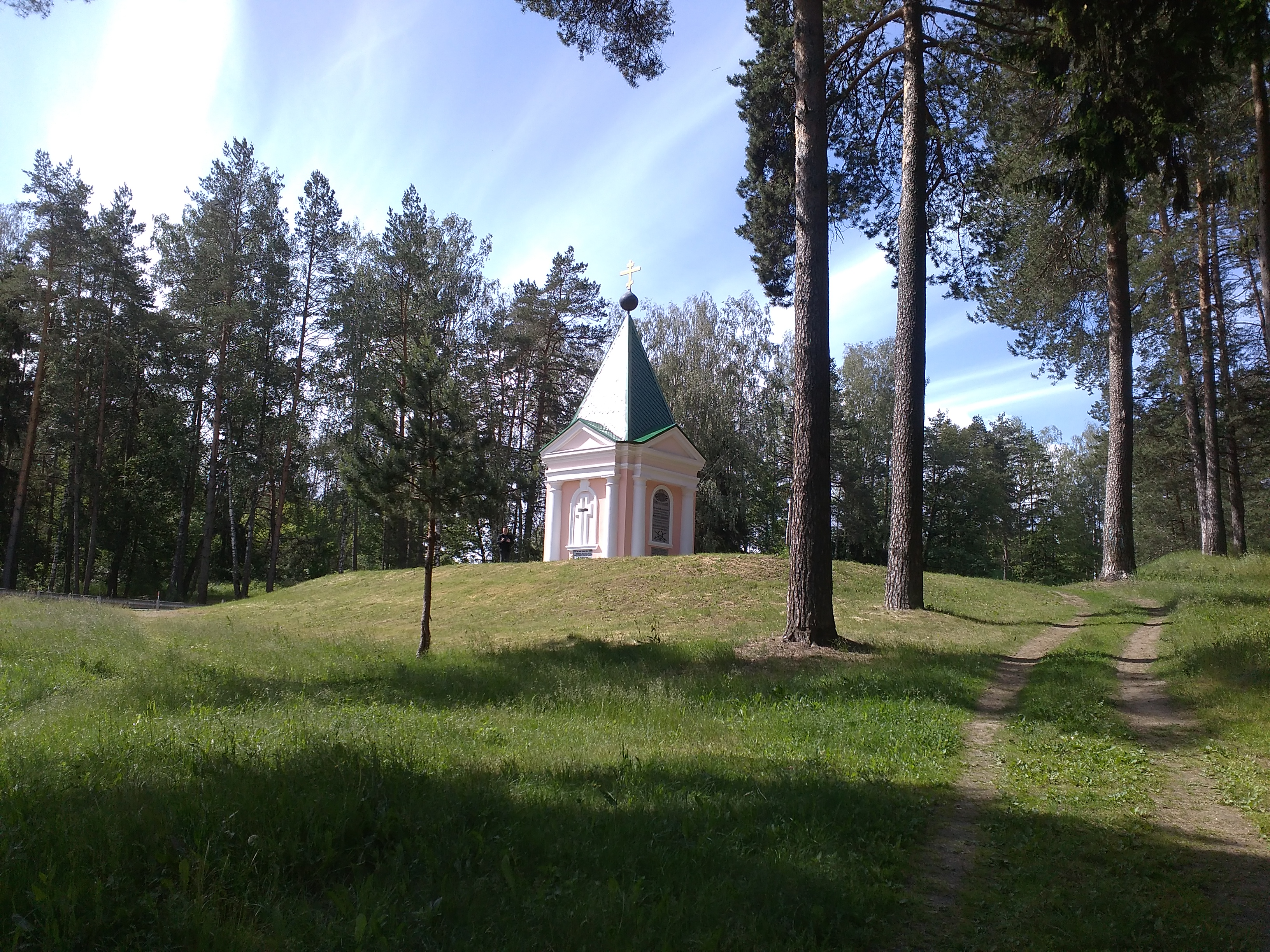 Мемориальная часовня в память об Отечественной войне 1812 года (построена в 1912 году)